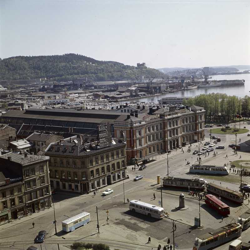 Østbanen og Jernbanetorget, torg, biler, trikk, mennesker, Østbanestasjonen.